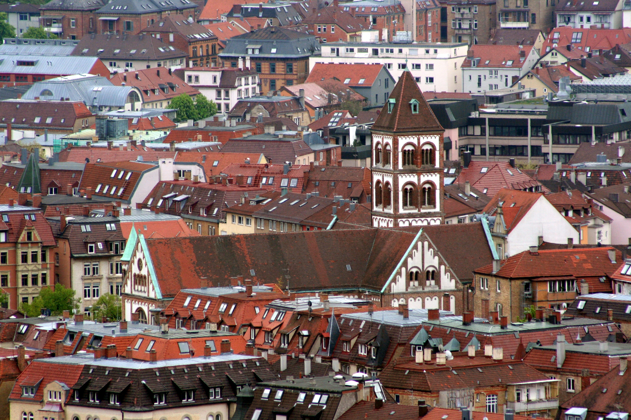 Kirche St. Elisabeth in Stuttgart-West